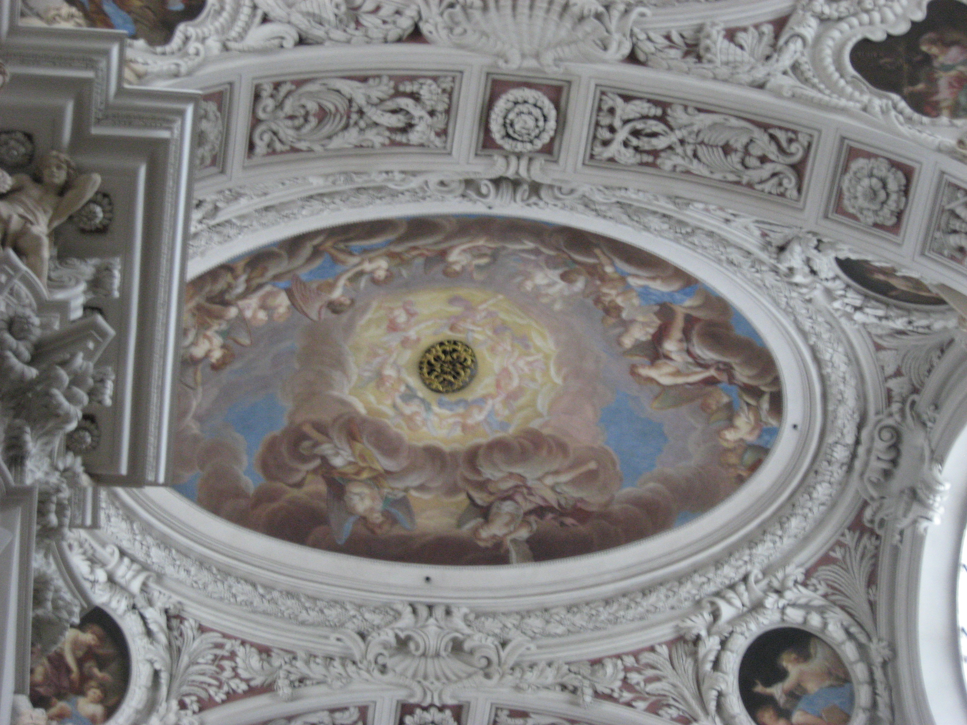 Dom St. Stephan (Passau), Fernorgel hinter dem Deckengemälde „Engelgruppen auf Wolken in Erwartung des heiligen Geistes“ von Carpoforo Tencalla, 1679-1685